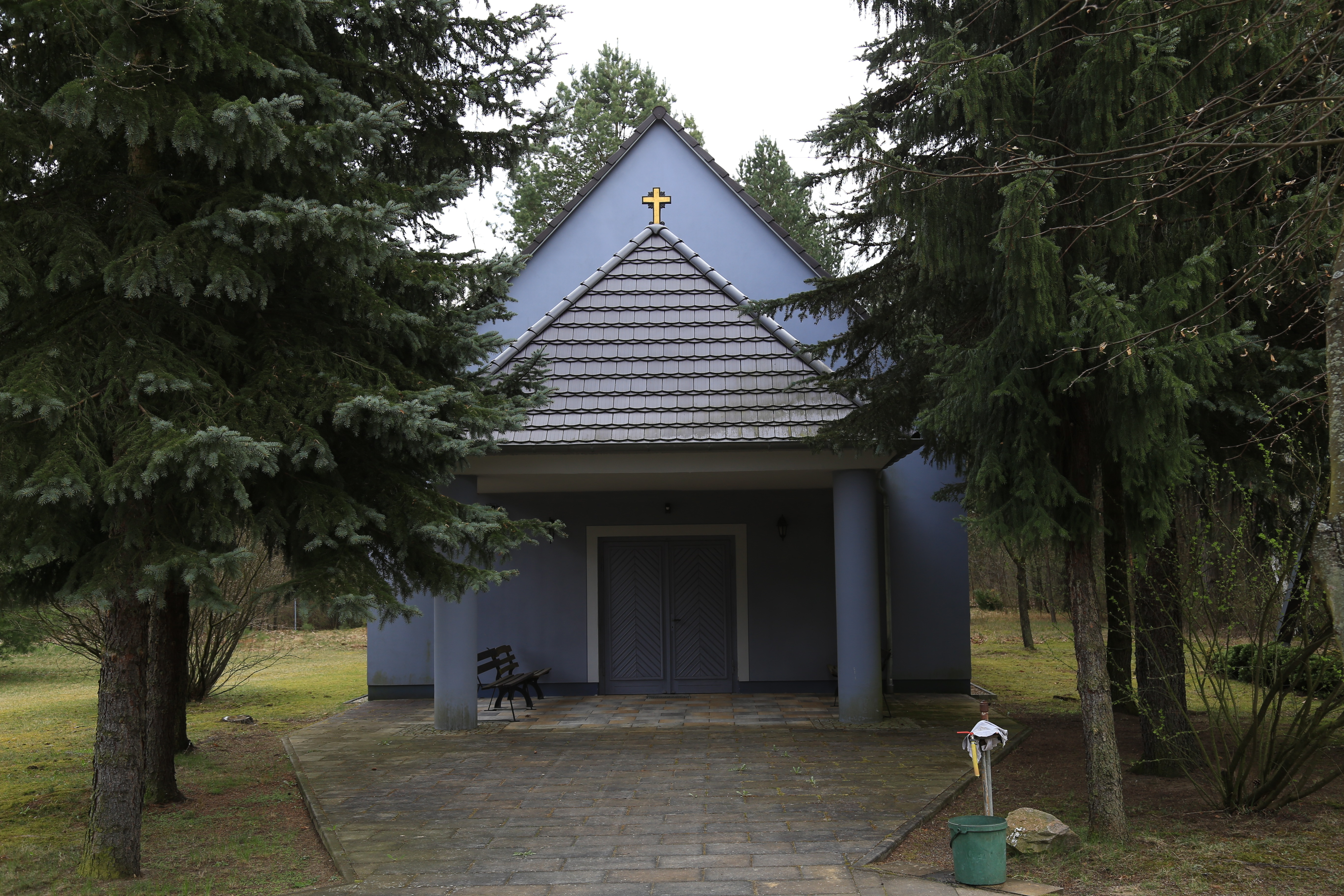 Ansichten Kapelle Neustadt (Spree) April 2017 (1) Hornjoserbsce: Kapałka na kěrchowje w Nowym Měsće při Sprjewi